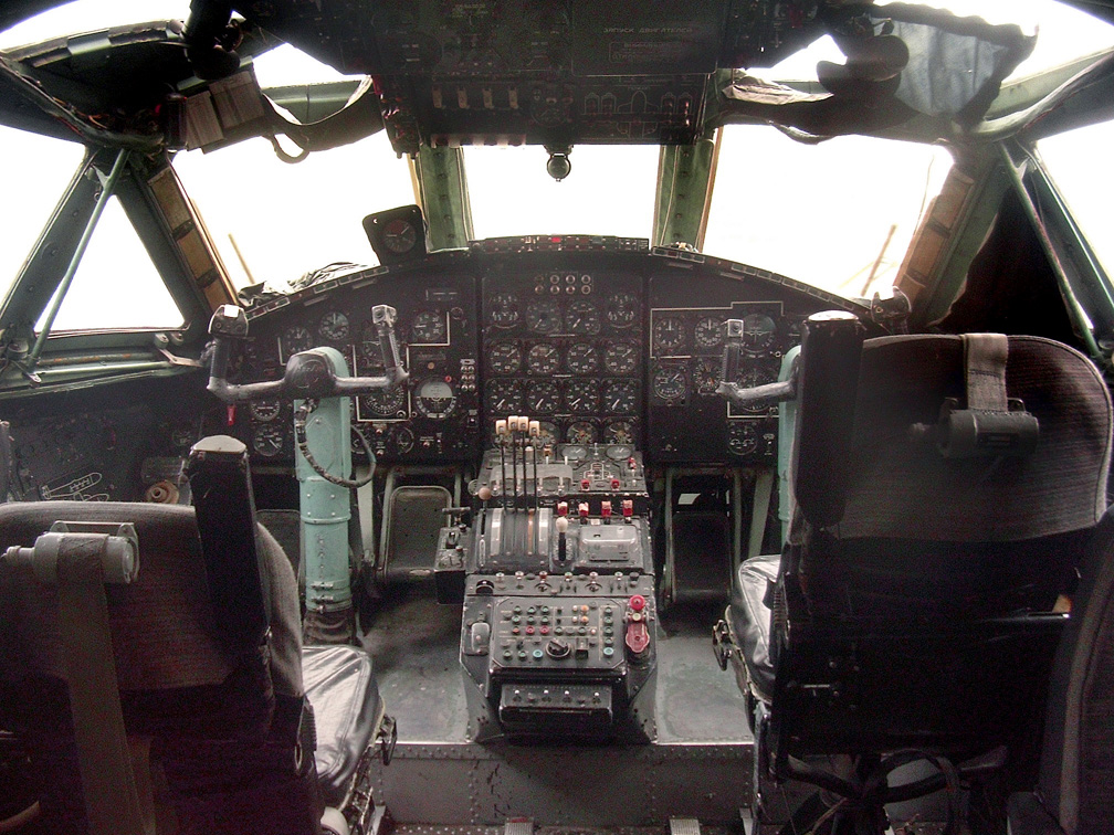 An-22 Сockpit